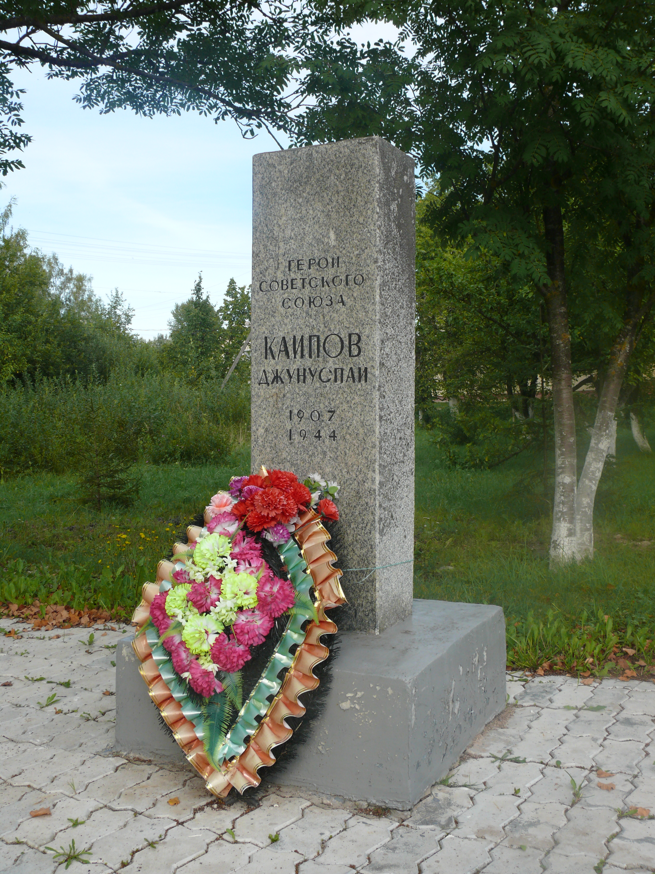 Могила Героя Советского Союза Каипова Джунспея в посёлке Батецкий Новгородской области